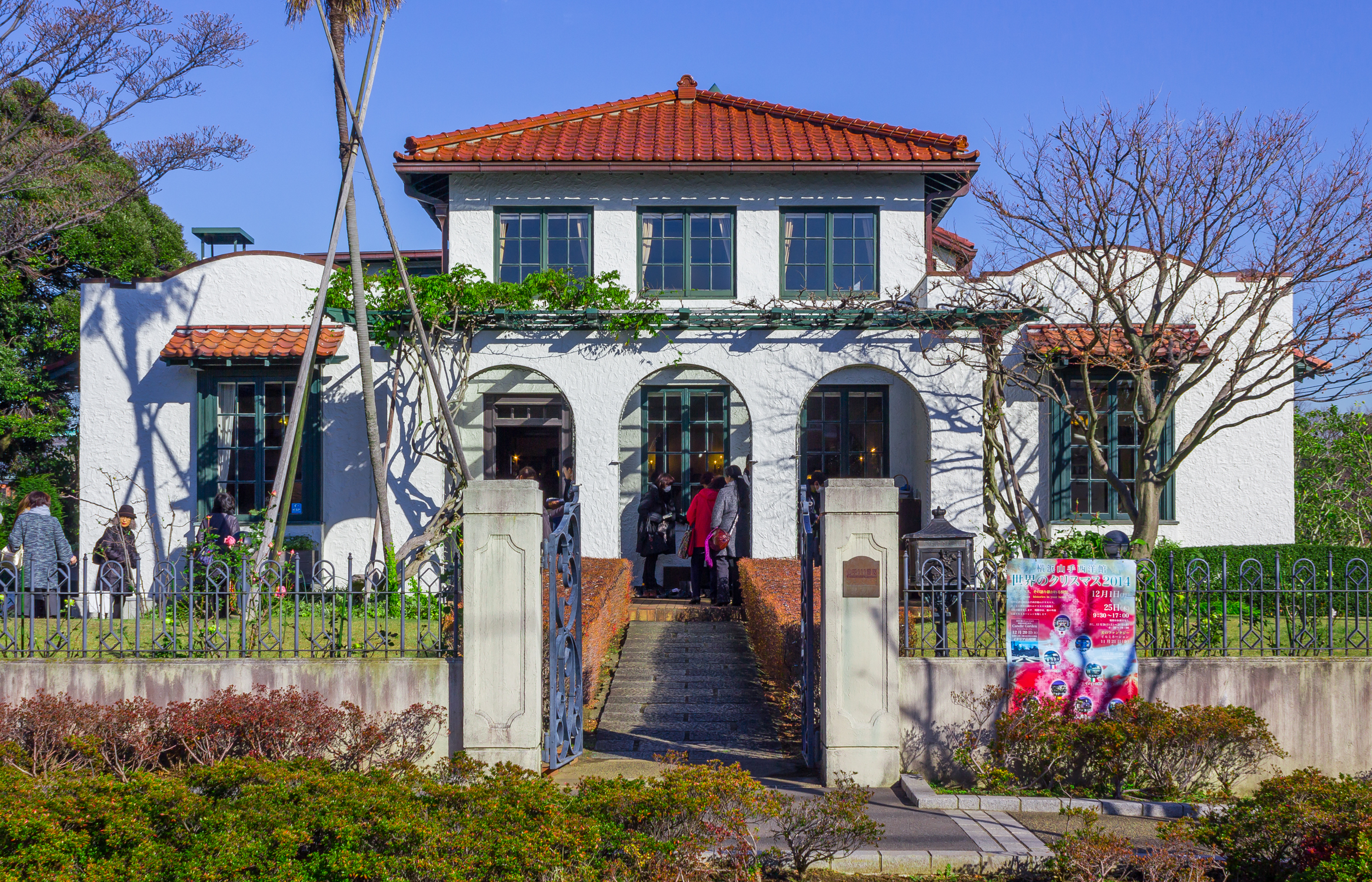 山手111番館（1926年）、J・H・モーガン設計、横浜市指定文化財。